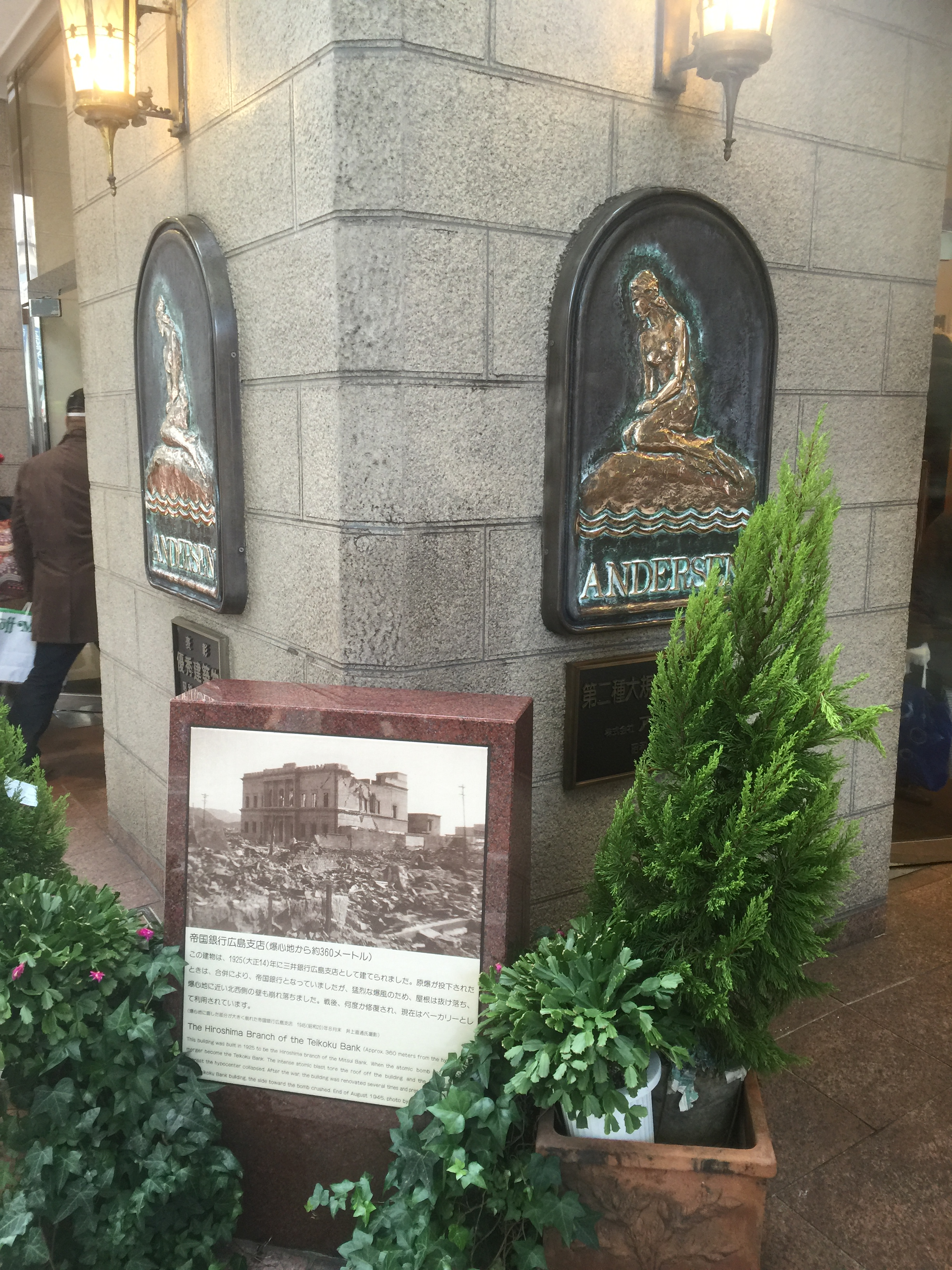 アンデルセン広島本店のモニュメントと被曝建物に関する説明碑。元帝国銀行広島支店。2016年取り壊し予定